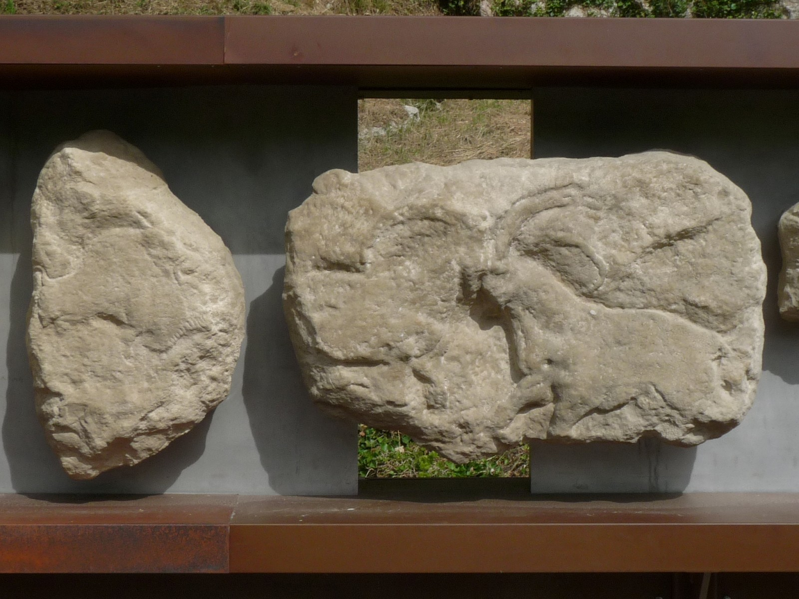 Reproduction de la frise (morceaux 3 et 4), Roc de Sers, Charente, France. A gauche: bisons, à droite: bouquetins